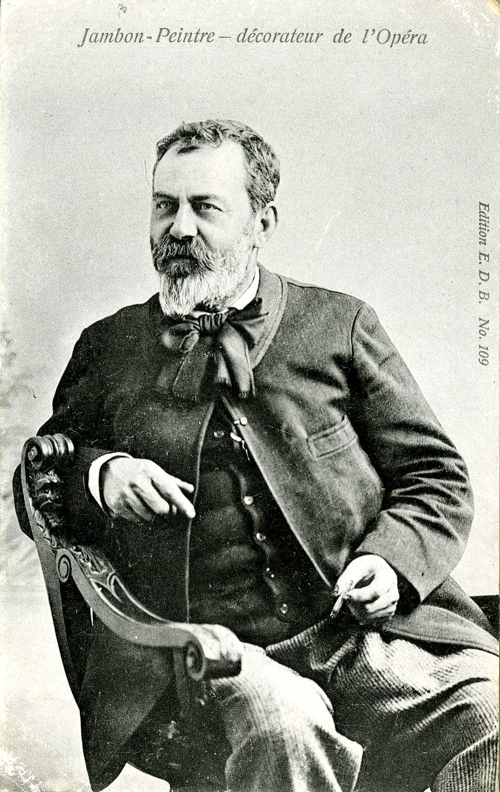 M. Jambon, peintre-décorateur de l'Opéra de Paris, décorateur des représentations du Théâtre des Arènes, à Béziers.